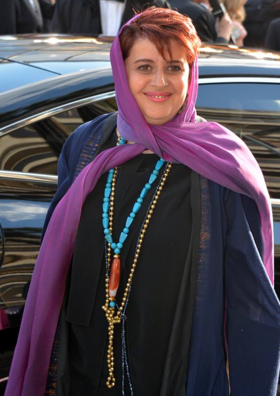 Katayoon Shahabi au festival de Cannes